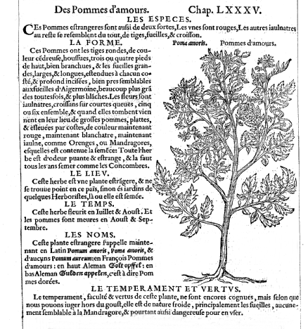 Image d'un pied de tomate (appelée « pomme d'amour »), extraite de l'Histoire des plantes, en laquelle est contenue la description entière des herbes... non seulement de celles qui croissent en ce païs, mais aussi des autres estrangères qui viennent en usage de médecine, par Rembert Dodoens... traduite de bas aleman en françois, par Charles de l'Escluse, 1557